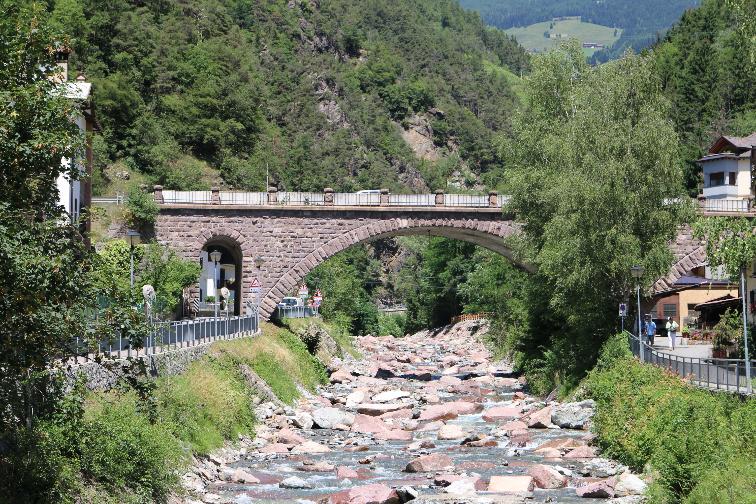 Klausen Südtirol: Tinnebachbrücke